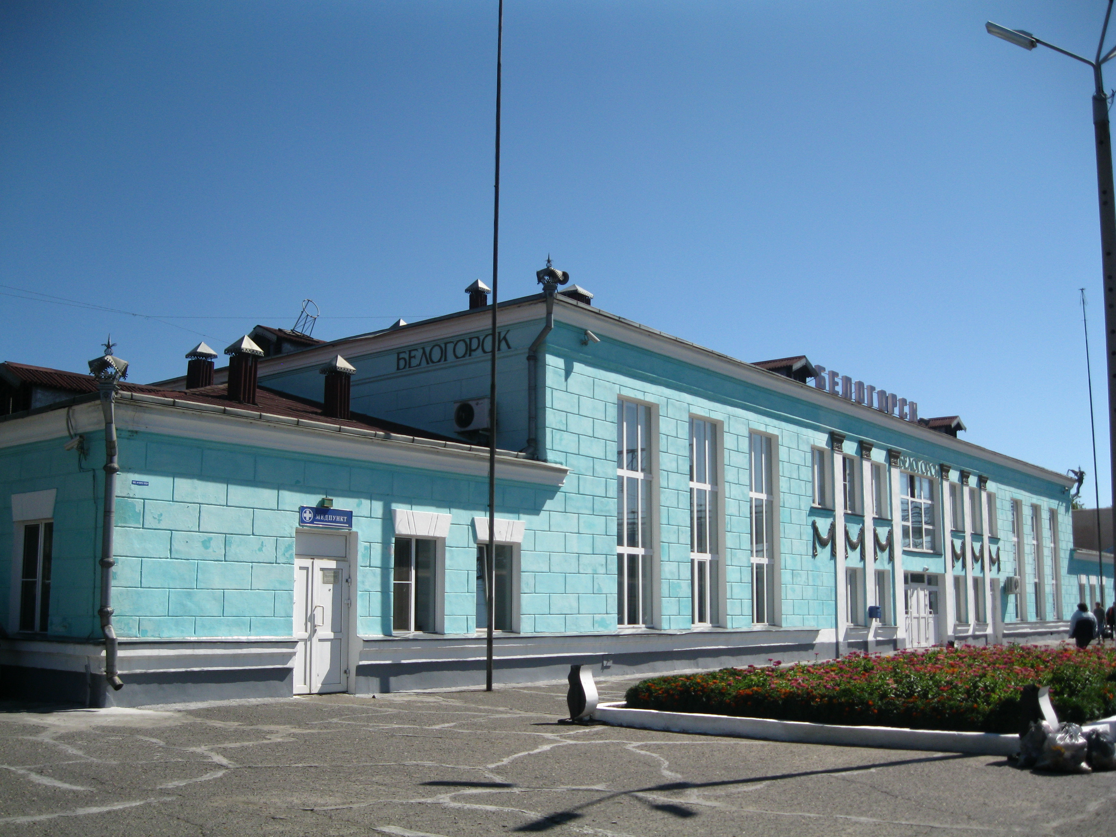 Вокзал станции Белогорск Забайкальской железной дороги, Белогорск, Амурская область, Россия